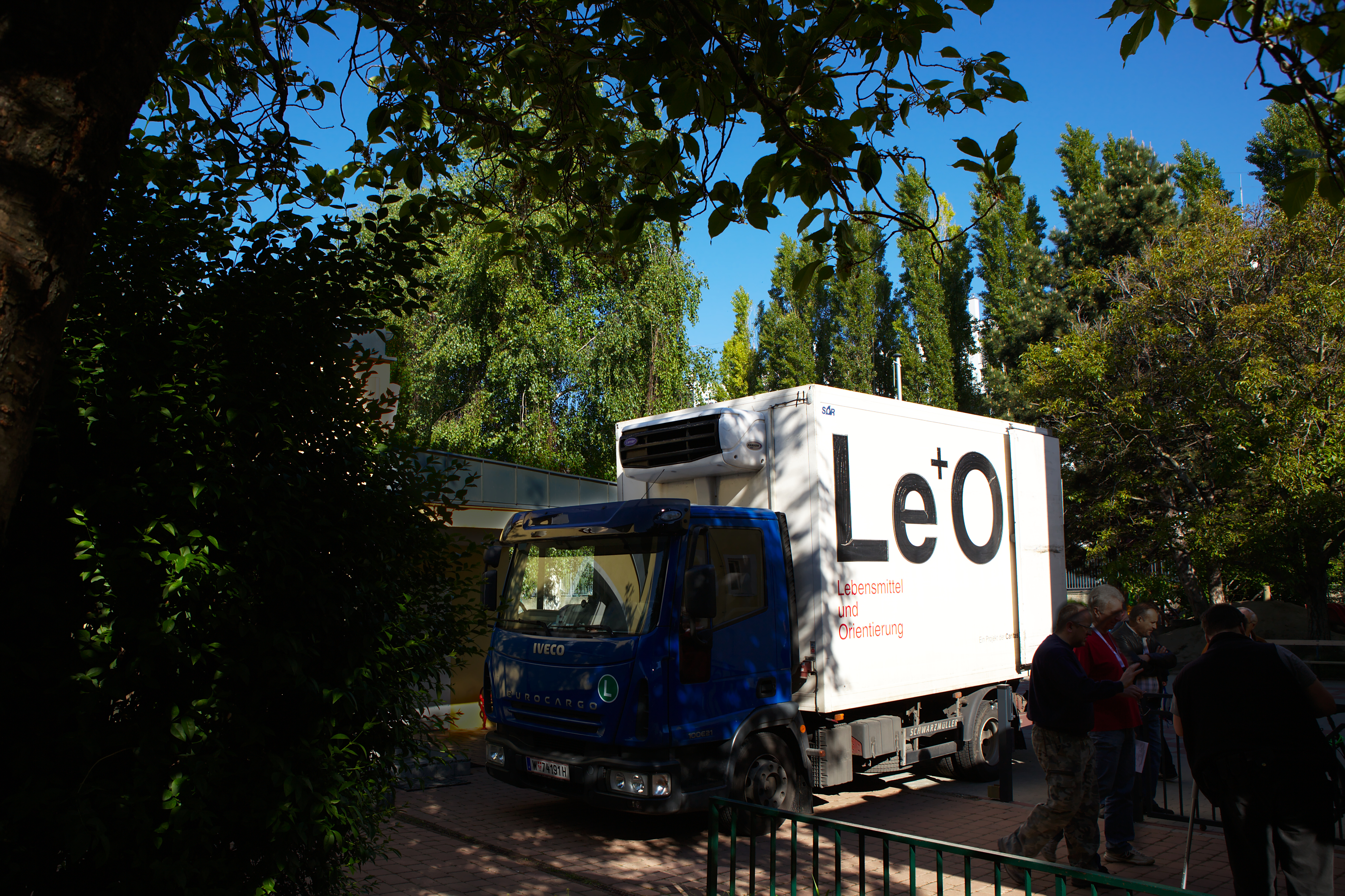 Le+O LKW der Caritas bei Essensausgabe in Pfarre Gartenstadt (Wien)